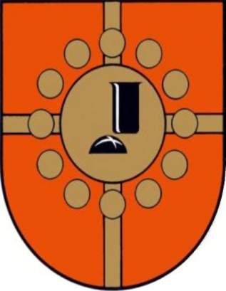 Wappen Fidelis Ruppert *1938 Abt von Münsterschwarzach 1982-2006